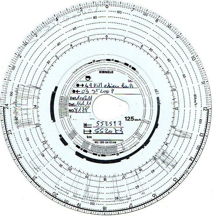 Disque de chronotachygraphe pour poids-lourds, clos.